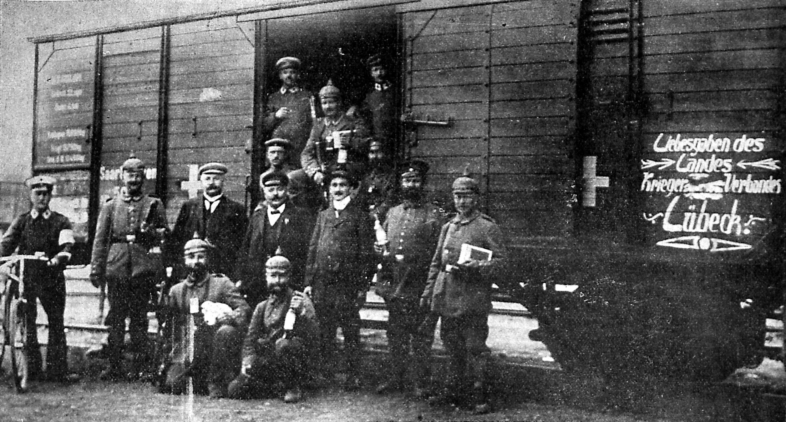 Lübecker mit Liebesgaben bei der Ostarmee.